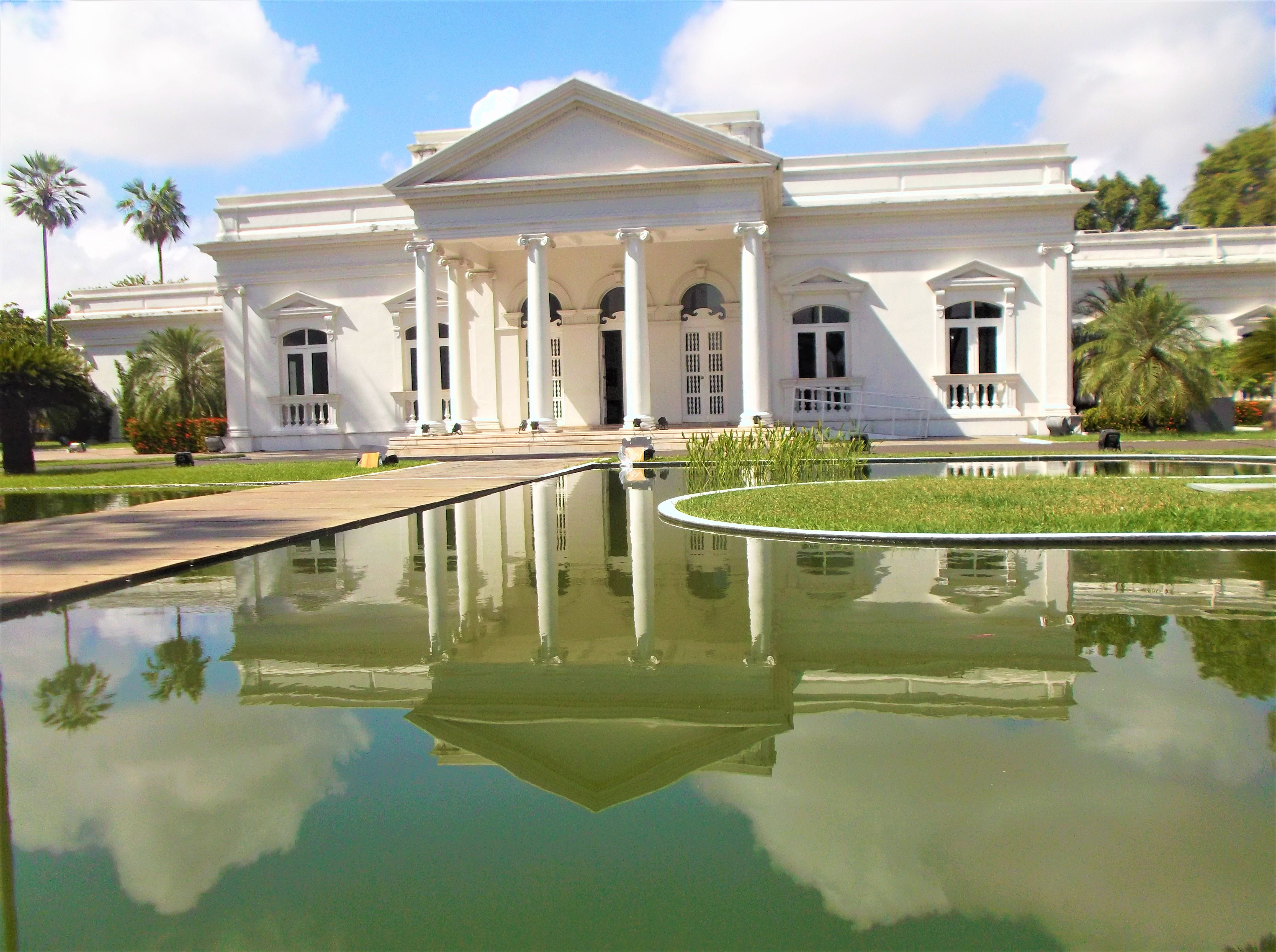 Imagem que fiz do Palácio de Karnak, em Teresina, no Piauí, Brasil.